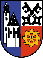 Tschagguns, Vorarlberg: In einem gespaltenen Schild, vorne in Blau eine silberne Kirche mit schwarzem Dach und Turmhelm, hinten in Silber und Rot geteilt, oben ein gekreuztes schwarzes Schlüsselpaar, unten ein goldenes Schaufelrad. (Verleihung: 13. Dezember 1965)